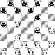 Двойной кол